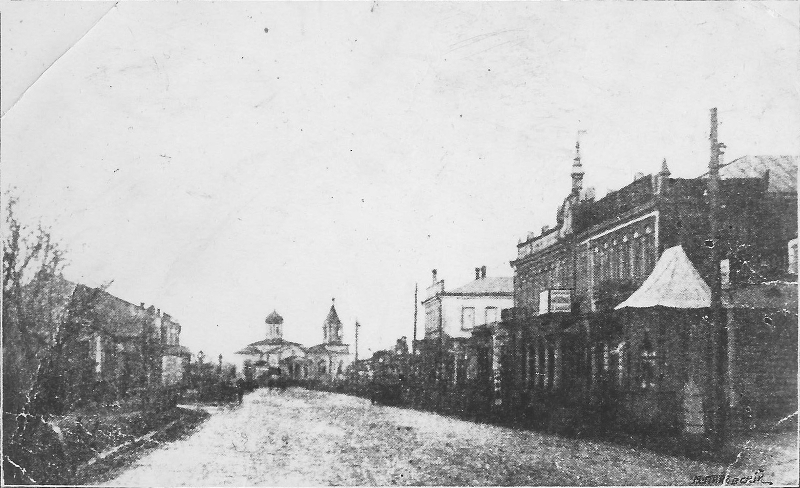 Кривой Рог. Почтовая улица